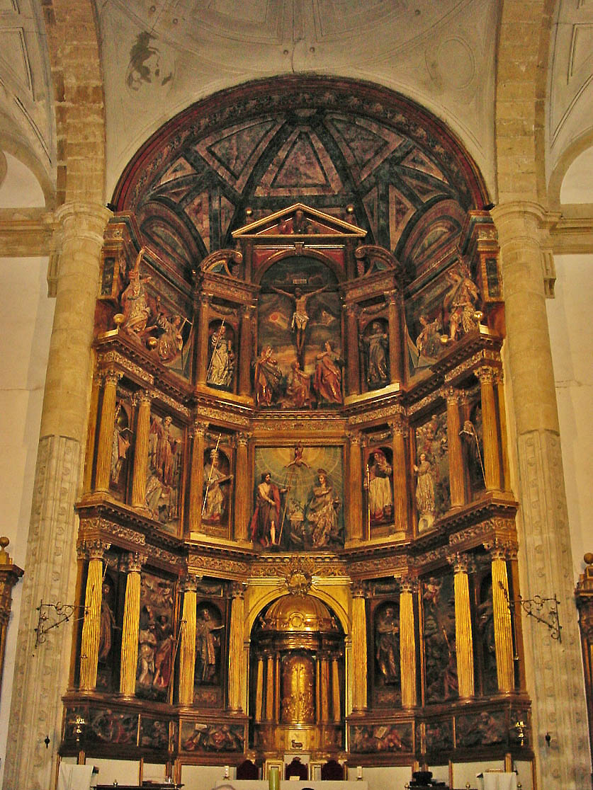 Nava del Rey es un municipio en la provincia de Valladolid, comunidad autónoma de Castilla y León, España. Retablo mayor de la iglesia de los Santos Juanes. Escultor: Gregorio Fernández.